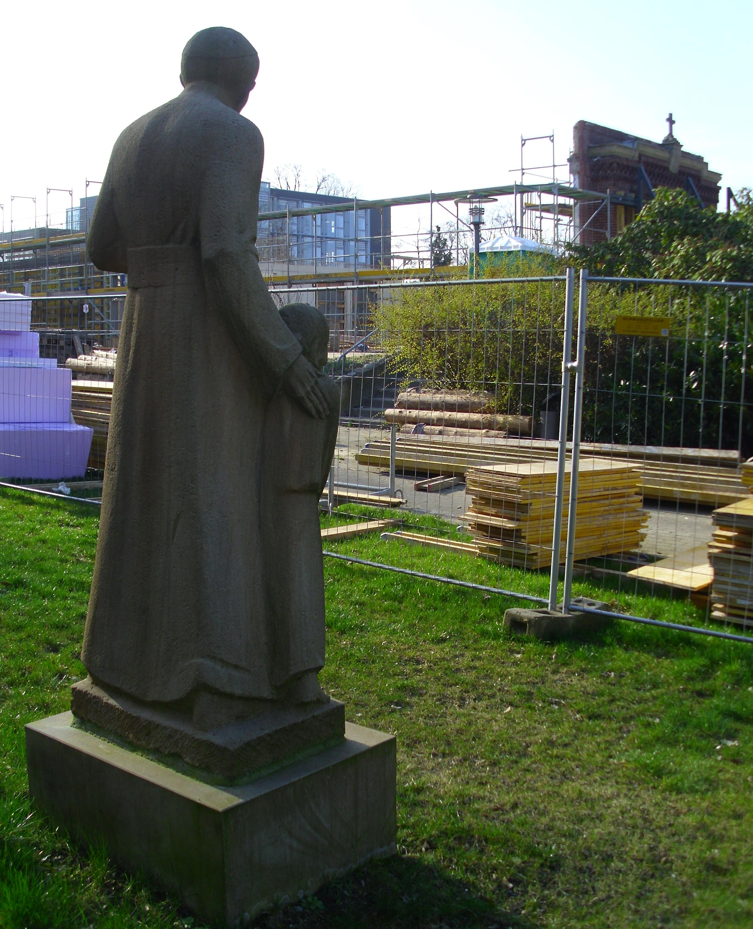 Bauphase der Erweiterung des AJG nach dem Abriss des Missionhauses in St. Arnold. Rechts im Bild das Denkmalgeschützte Portal. Links im Vordergrund das Sandsteinbildnis des Arnold Janssen.